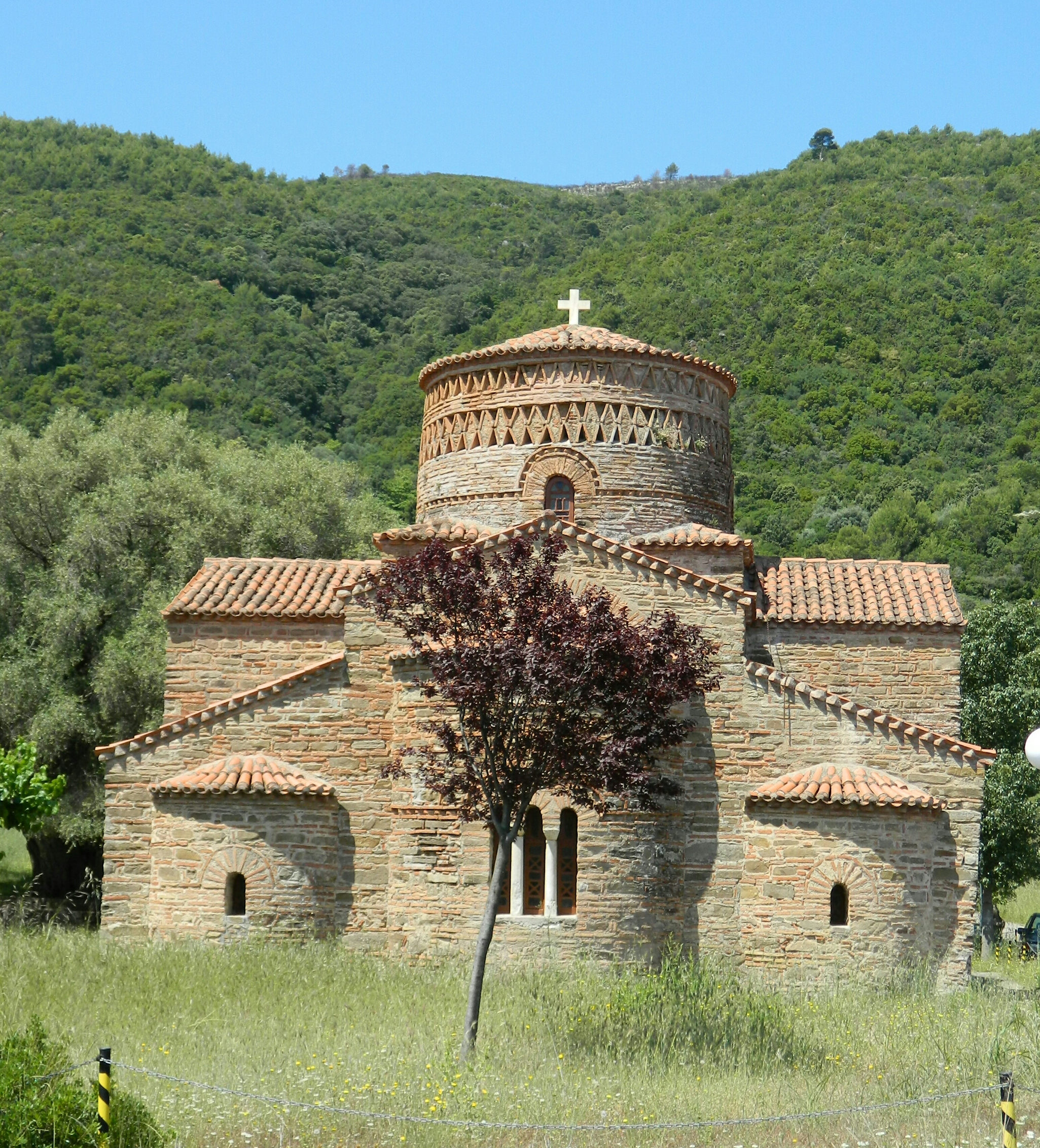 Ναός Παναγίας Παναξιώτισσας Γαυρολίμνης«Ναός Παναγίας Παναξιώτισσας Γαυρολίμνης»